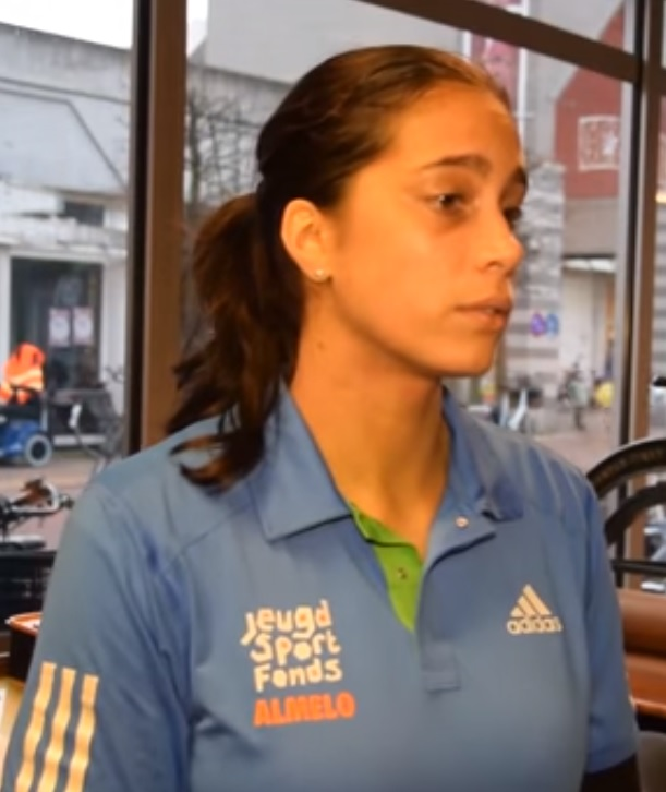 Reshmie Oogink (screenshot)